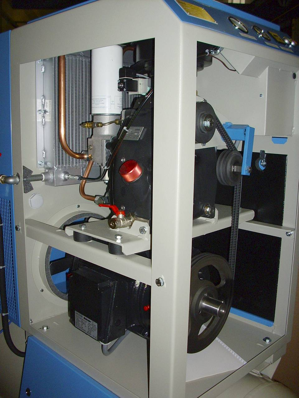 Wnętrze typowej sprężarki.